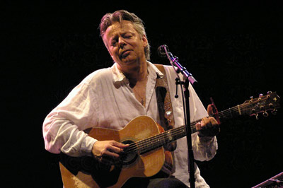 Photographie de Tommy Emmanuel prise lors de son concert à Niort (France) en 2006. Auteur : Nicolas DUVIVIER